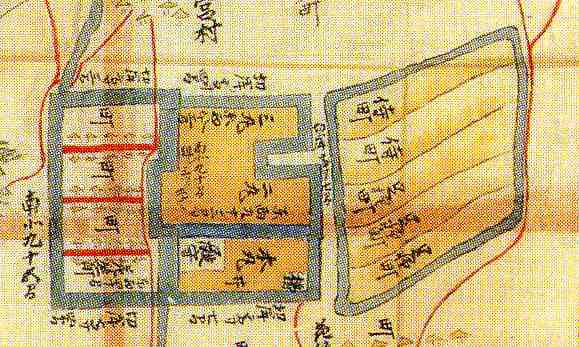 摂津国花熊之城図（城郭部分を拡大）